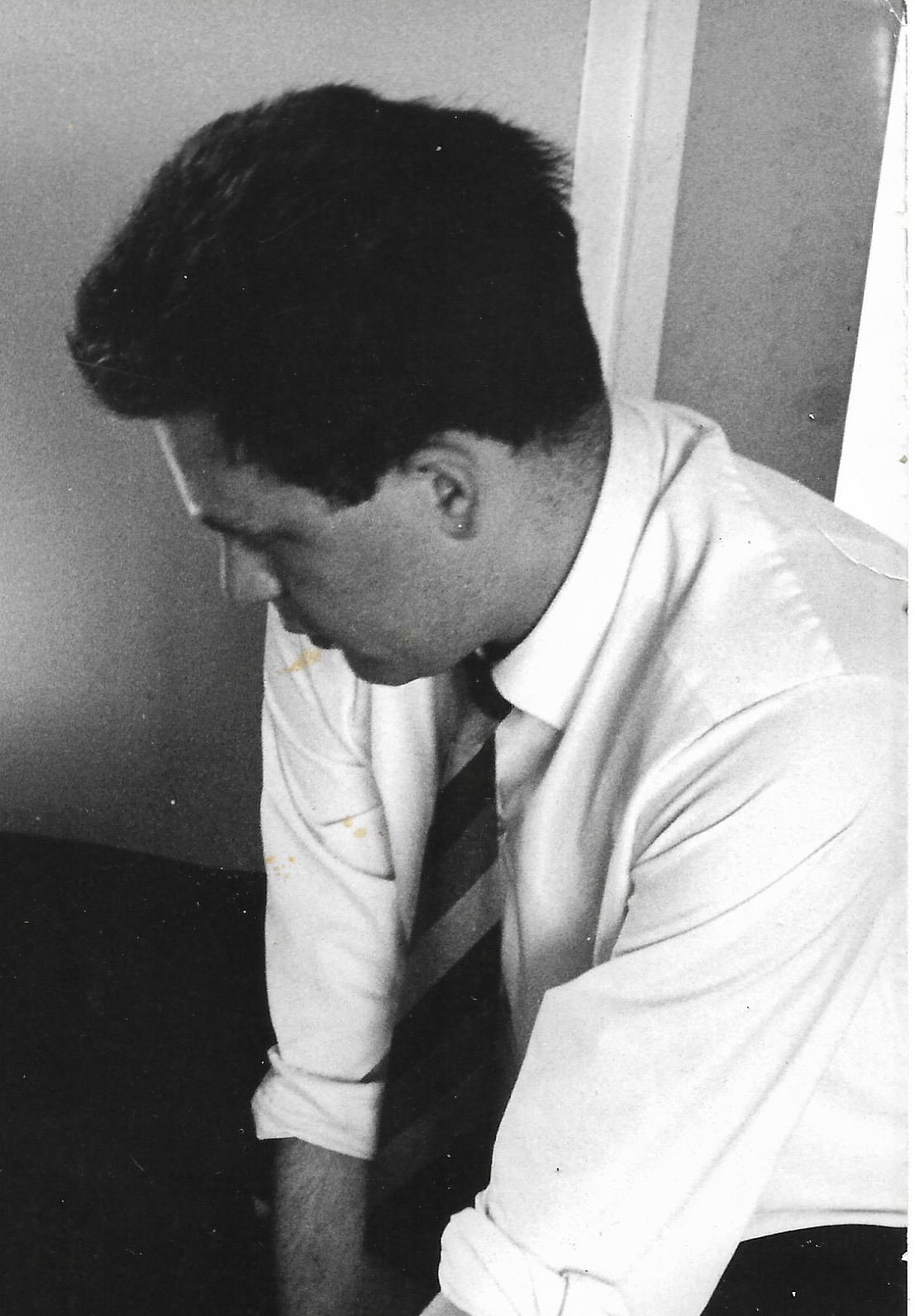 Maurice Matieu